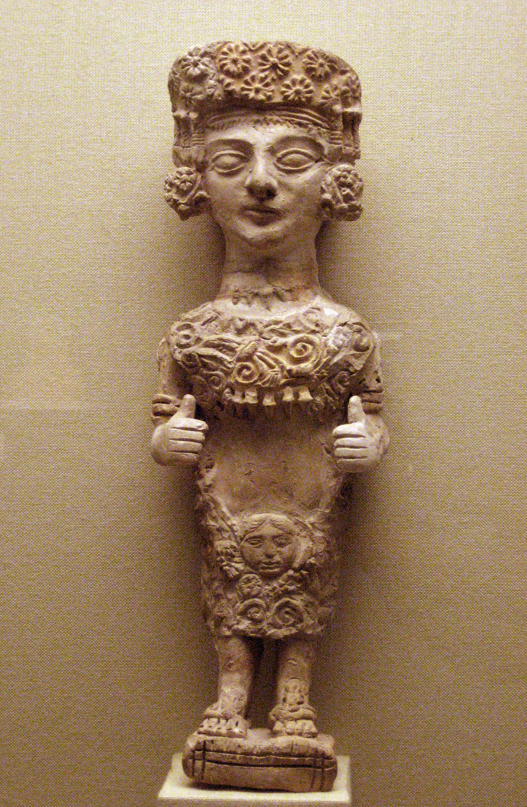 Imagen de la cultura púnica (siglo IV- III aC) procedente de la Necrópolis Puig des Molins (Ibiza). España Conservada en el Museu d'Arqueologia de Catalunya (MAC)